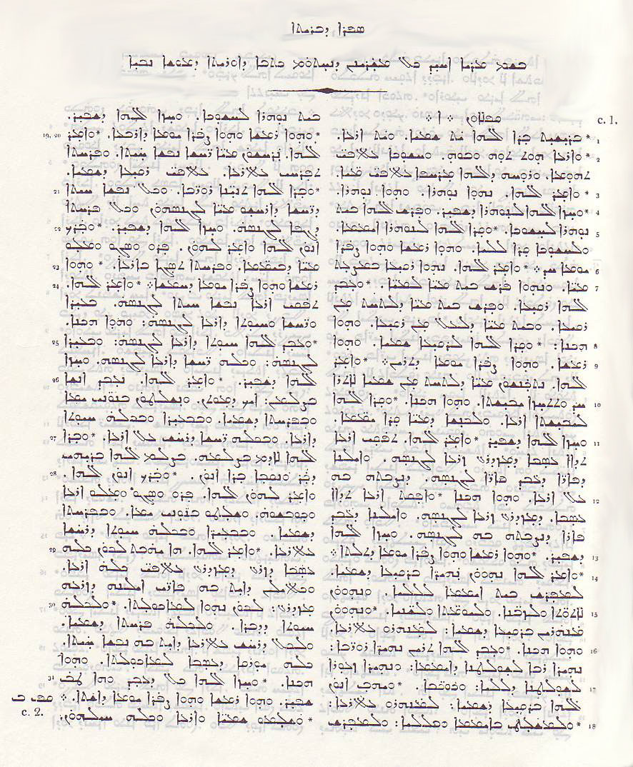 Ukázka moderního tisku písmem Serto s primitivní punktací Gn syrská Bible USB 1979/1996